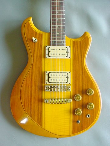 Ibanez_Studio_ST-370_electric_guitar_body